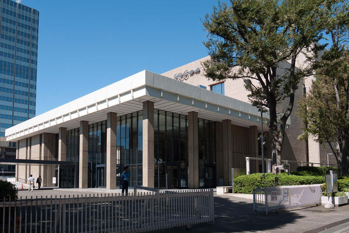 渋谷NHKホール。